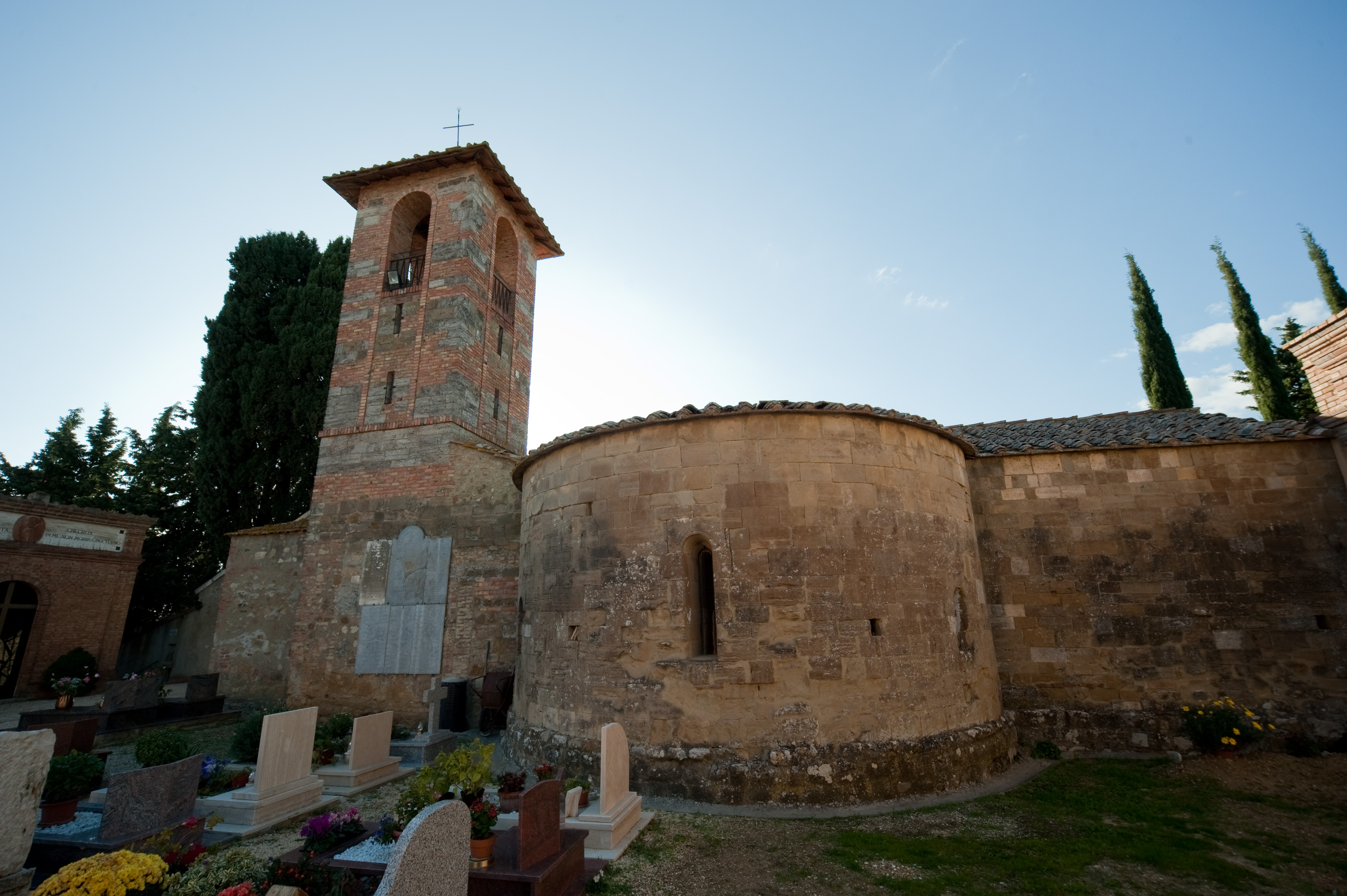 Abside della chiesa di san Niccolò a Casole d'Elsa